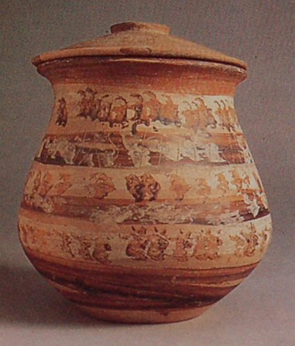 Fotografia di un vaso veneto tratta da Il Veneto nell'antichità: preistoria e protostoria di A. Aspes, libro stampato a Verona nel 1984.